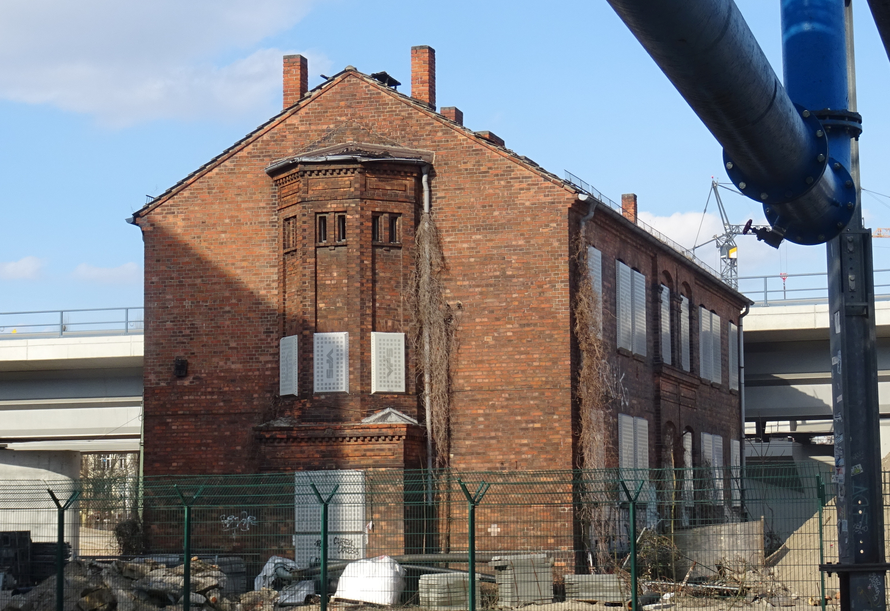 Eisenbahnerwohnhaus, Berlin; Markgrafendamm, Kulturdenkmal